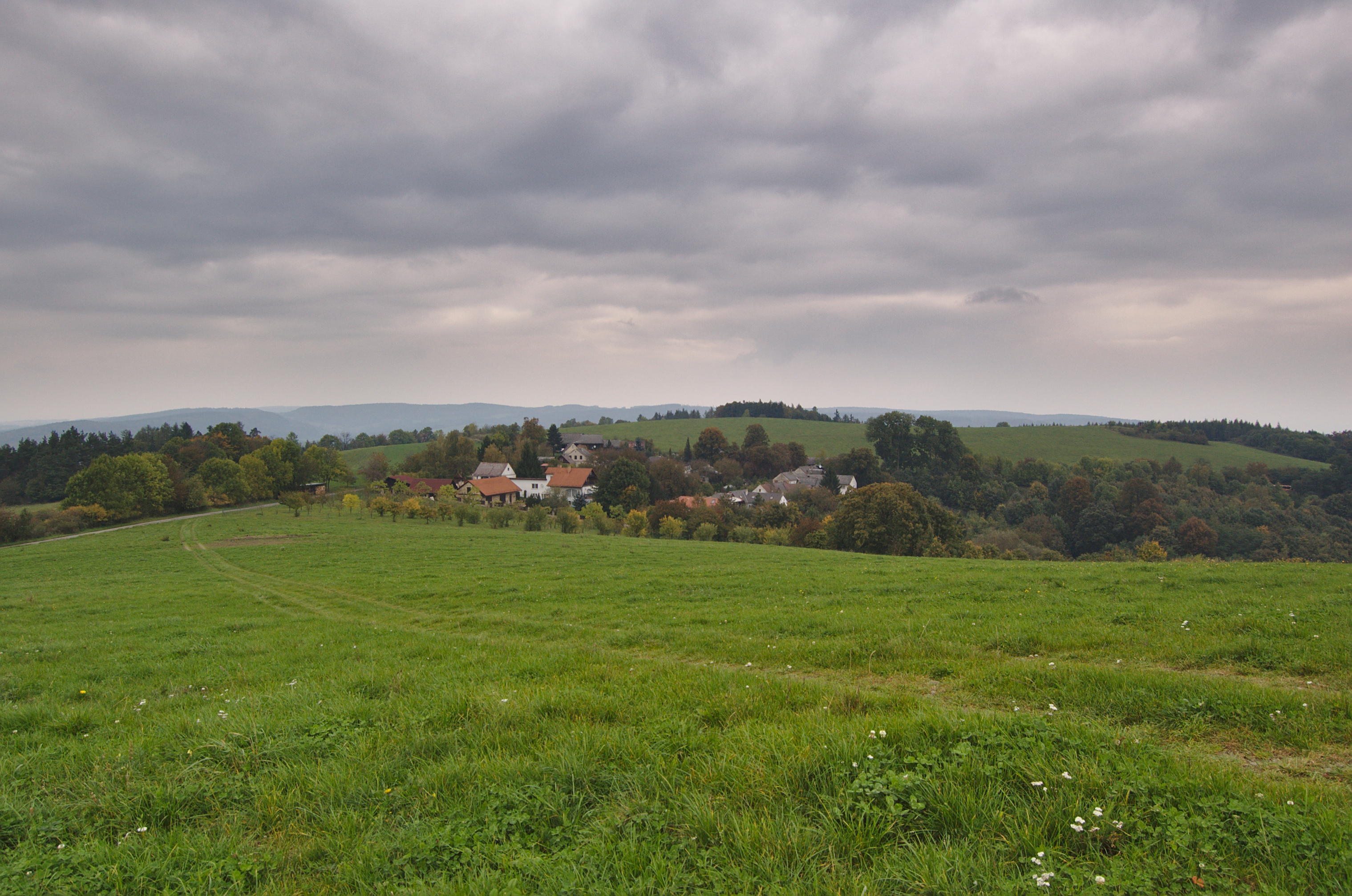 Pohled na obec, Nová Roveň, Městečko Trnávka, okres Svitavy